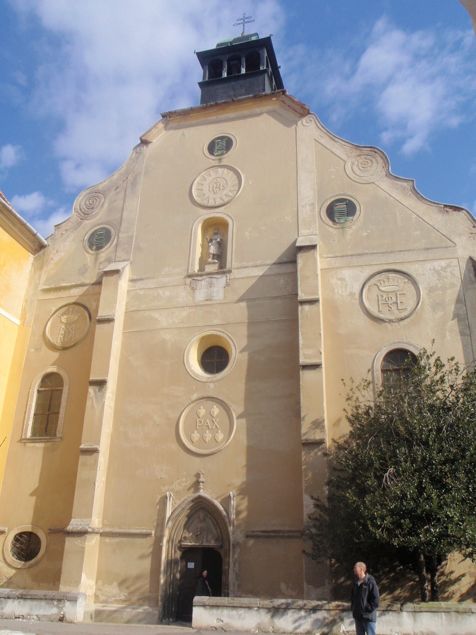 Sankt Jakobus Kirche Güns